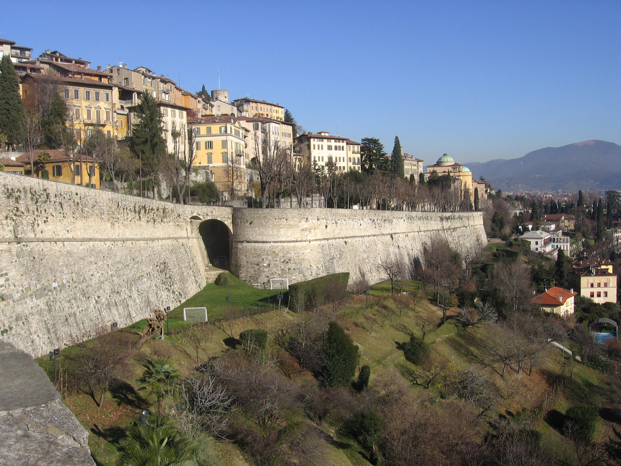 Piattaforma di Sant'Andrea (vista dalla porta di San Giacomo), Mura Venete, Bergamo, Italy